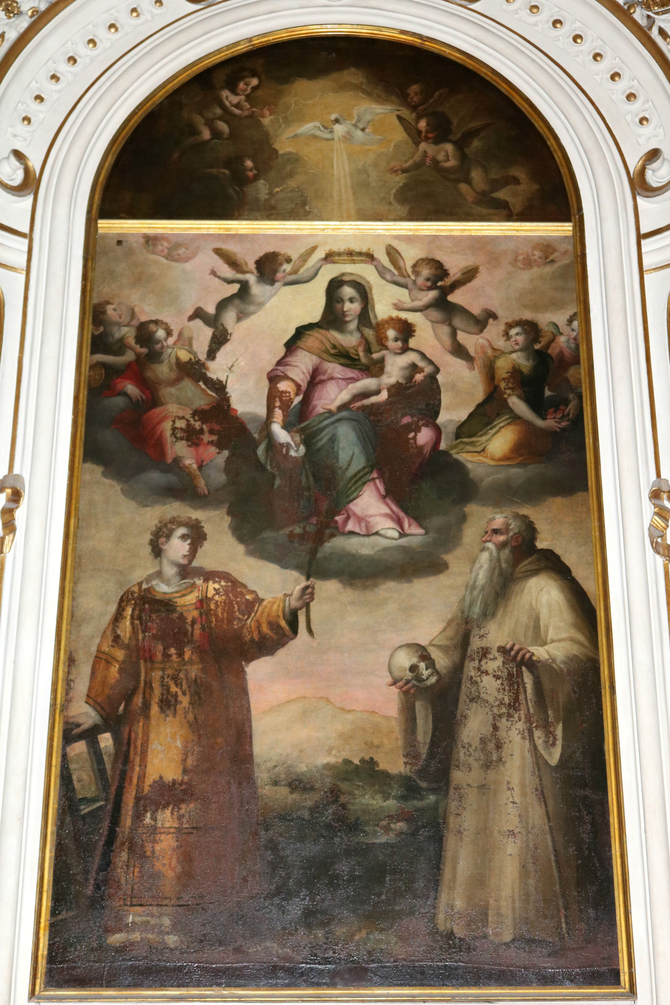 Collegiata di San Lorenzo (Montevarchi)